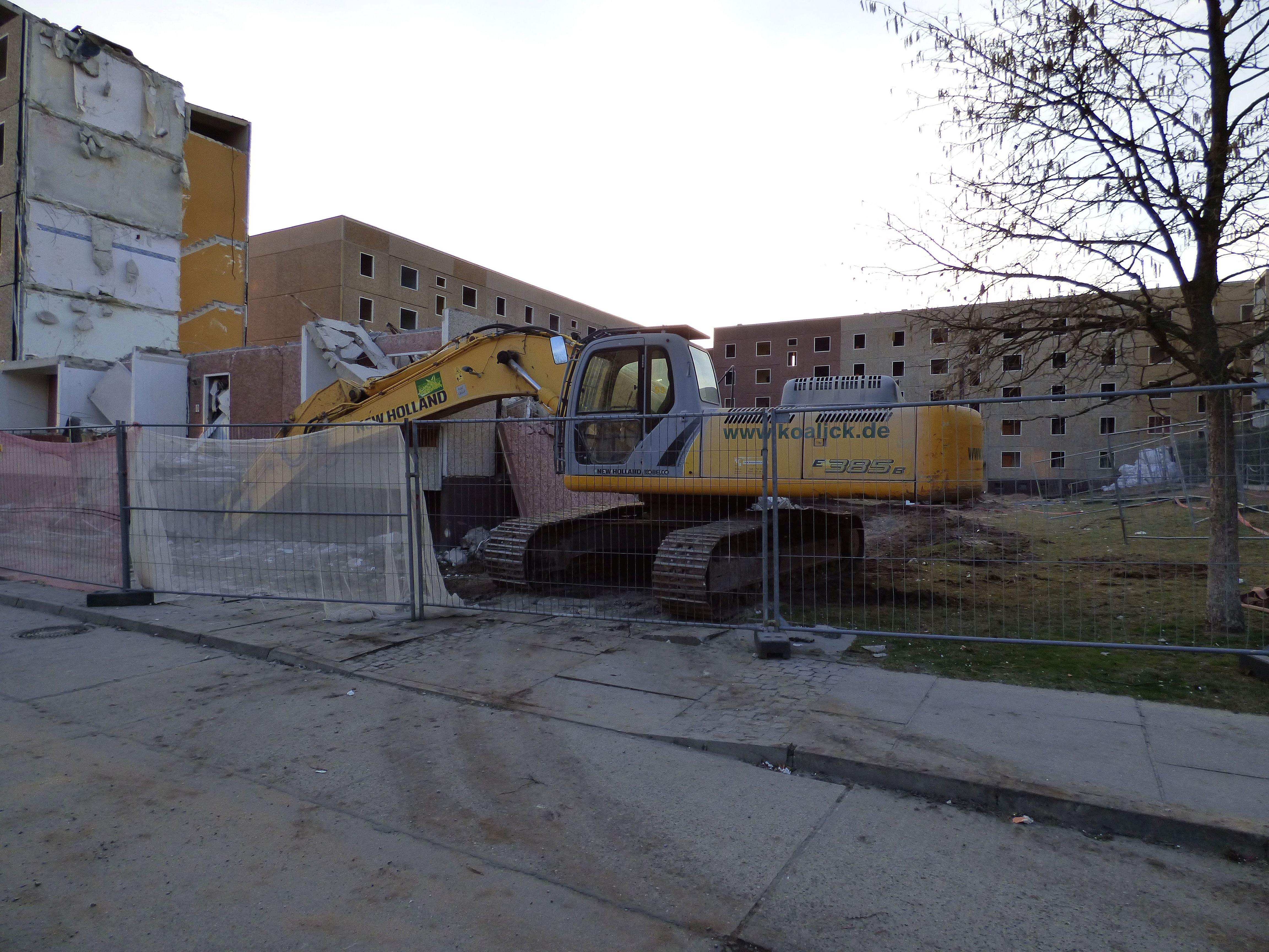 Hans-Nadler-Eck im Elsterwerda Stadtteil Elsterwerda-West